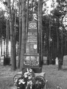 Памятник евреям города Узда Минской области – жертвам Холокоста. Установлен на еврейском кладбище.